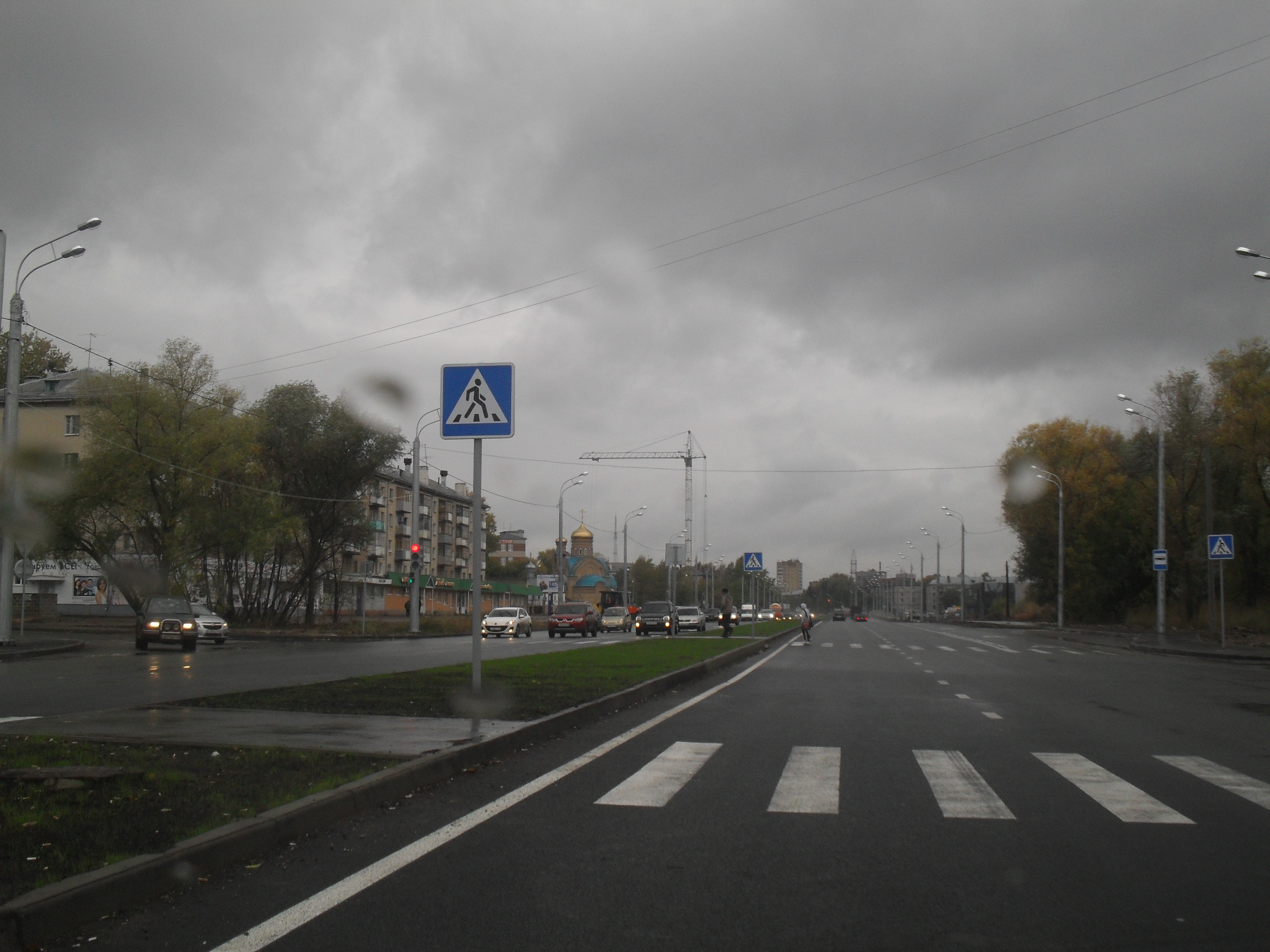 Улица Вахитова в Казани, новый участок дороги от Б.Крыловка-Краснококшайская